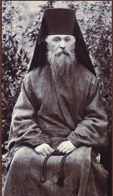 Монах Алексий (Шушания)